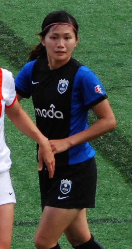 Nahomi Kawasumi avec Seattle en juin 2014.